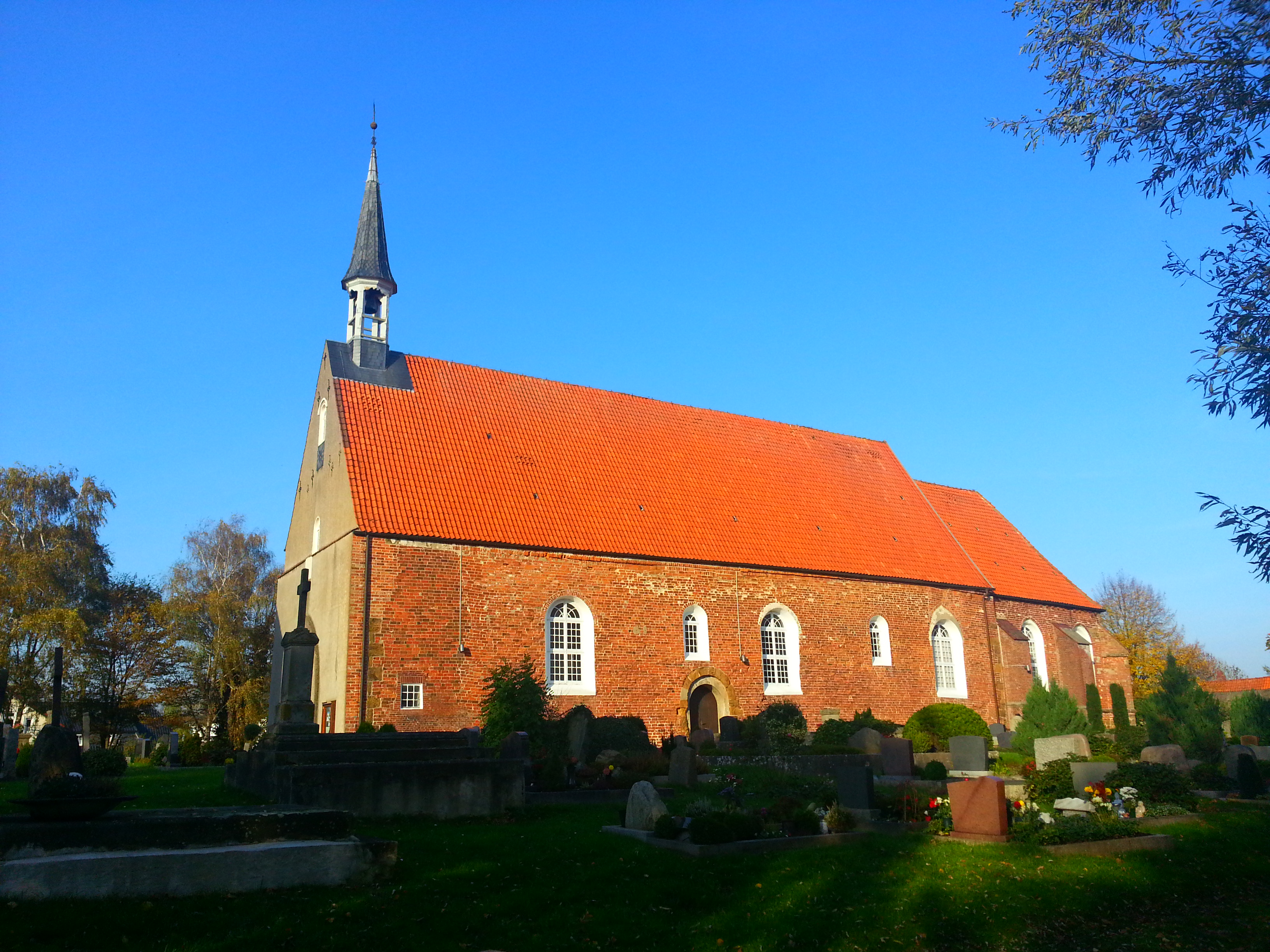 Bartholomäuskirche Brake Golzwarden